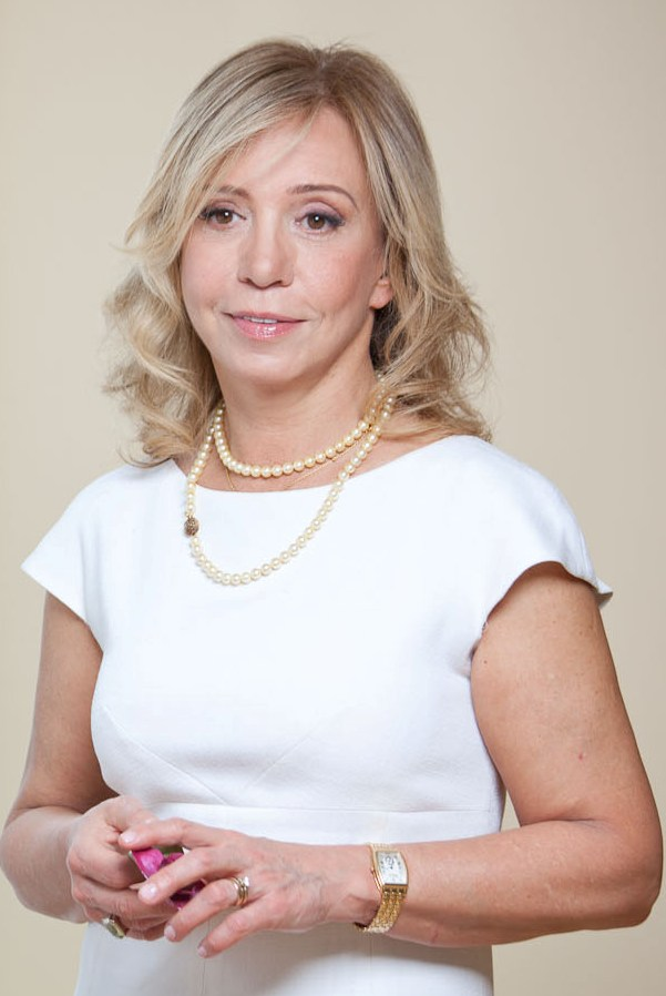 Елена Котова, экономист